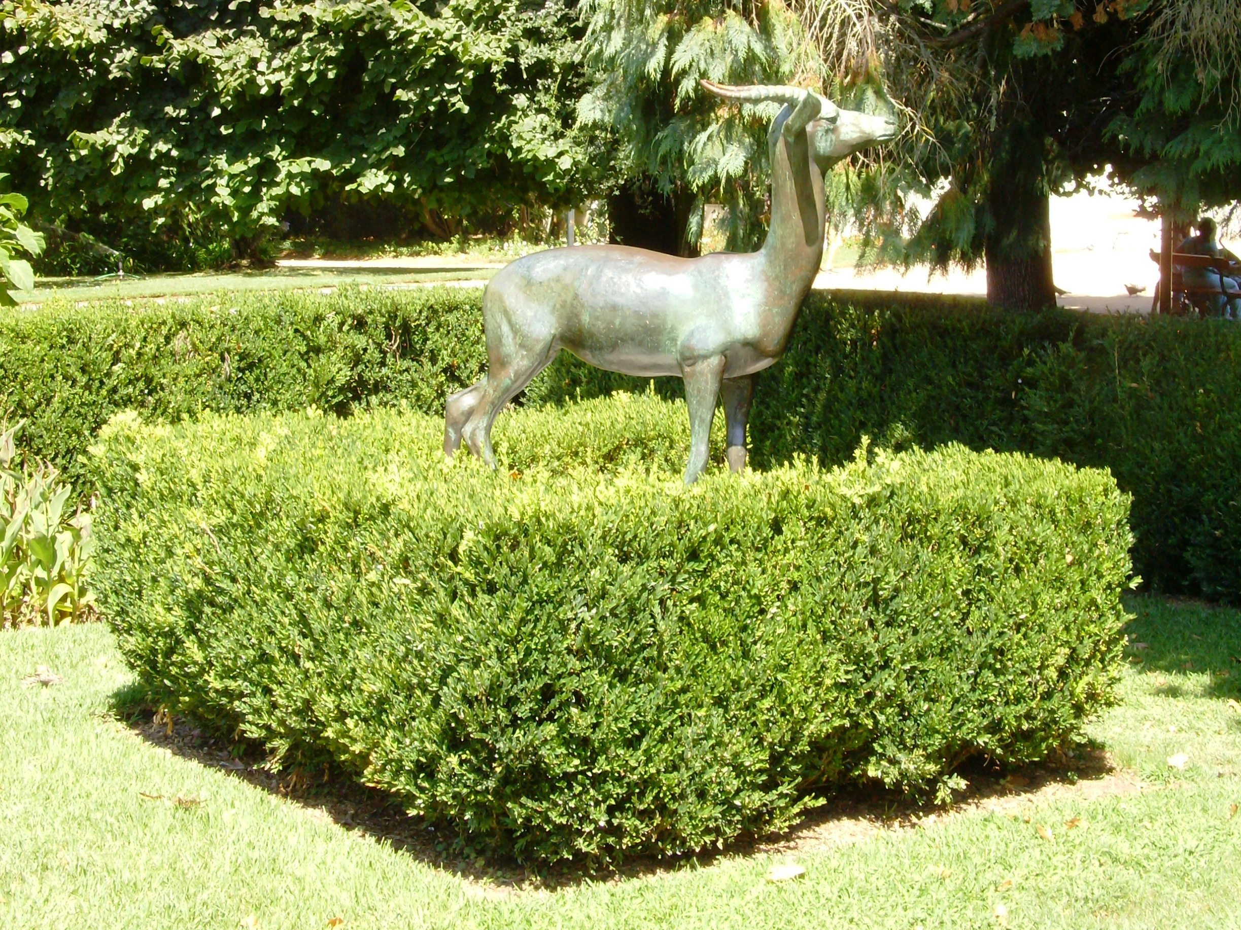 "Cabra de Leque" (Antidorcas marsupialis), bronze por Artur Gaspar dos Anjos Teixeira. Parque D. Carlos I, Caldas da Rainha, Distrito de Leiria, Portugal.